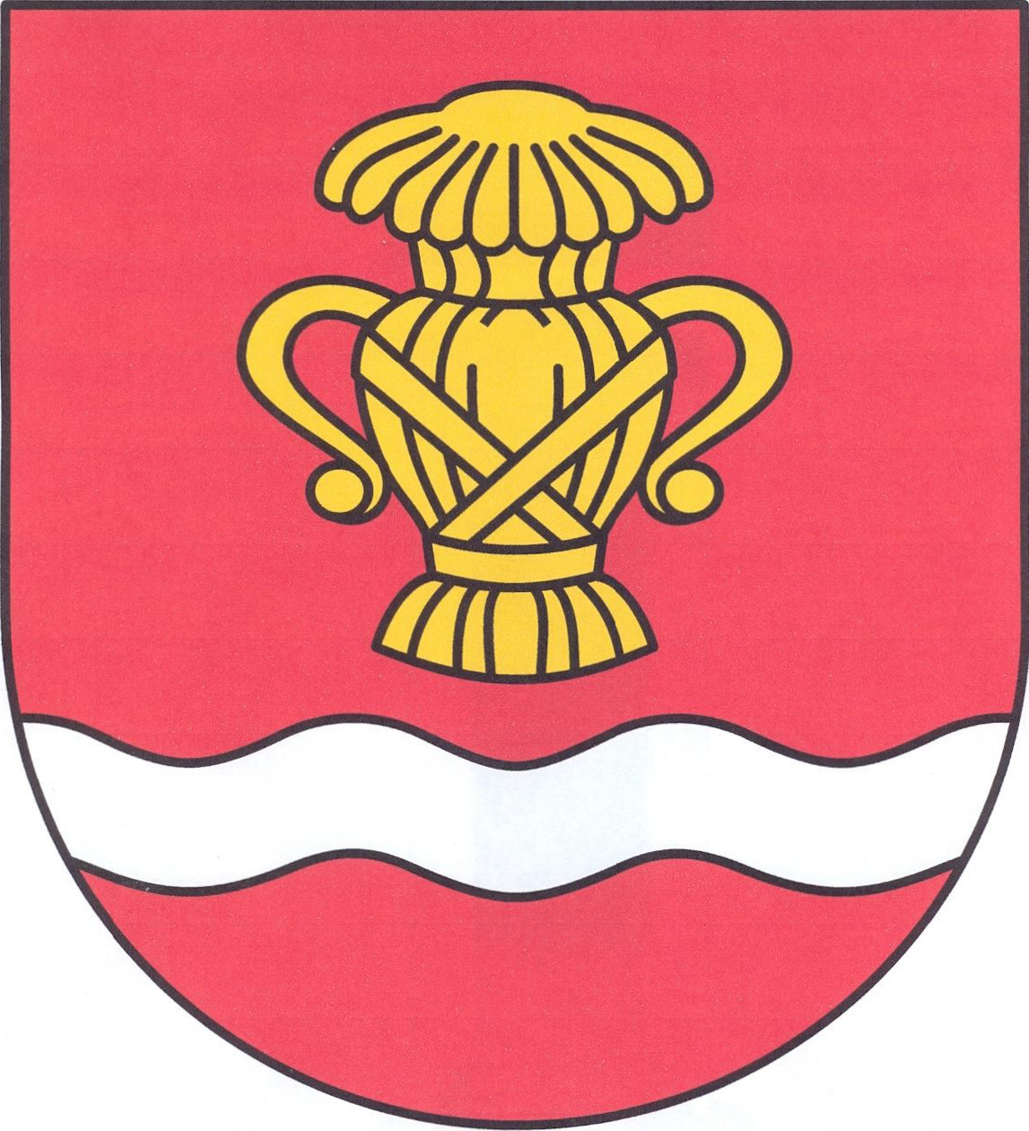 Herb gminy Książki